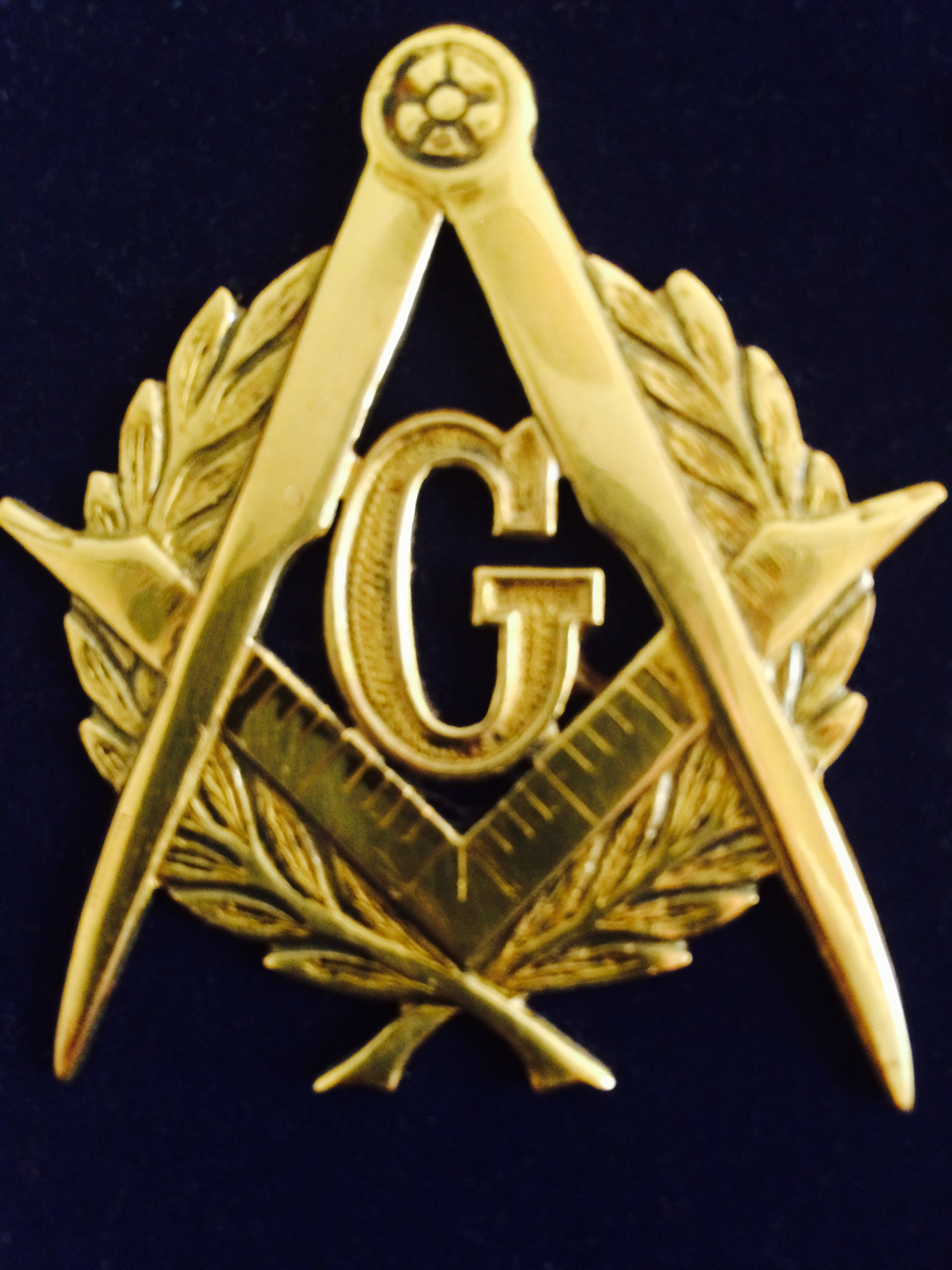 Escuadra y Compás, obra confeccionada por un artesano de la Masonería Chilena.